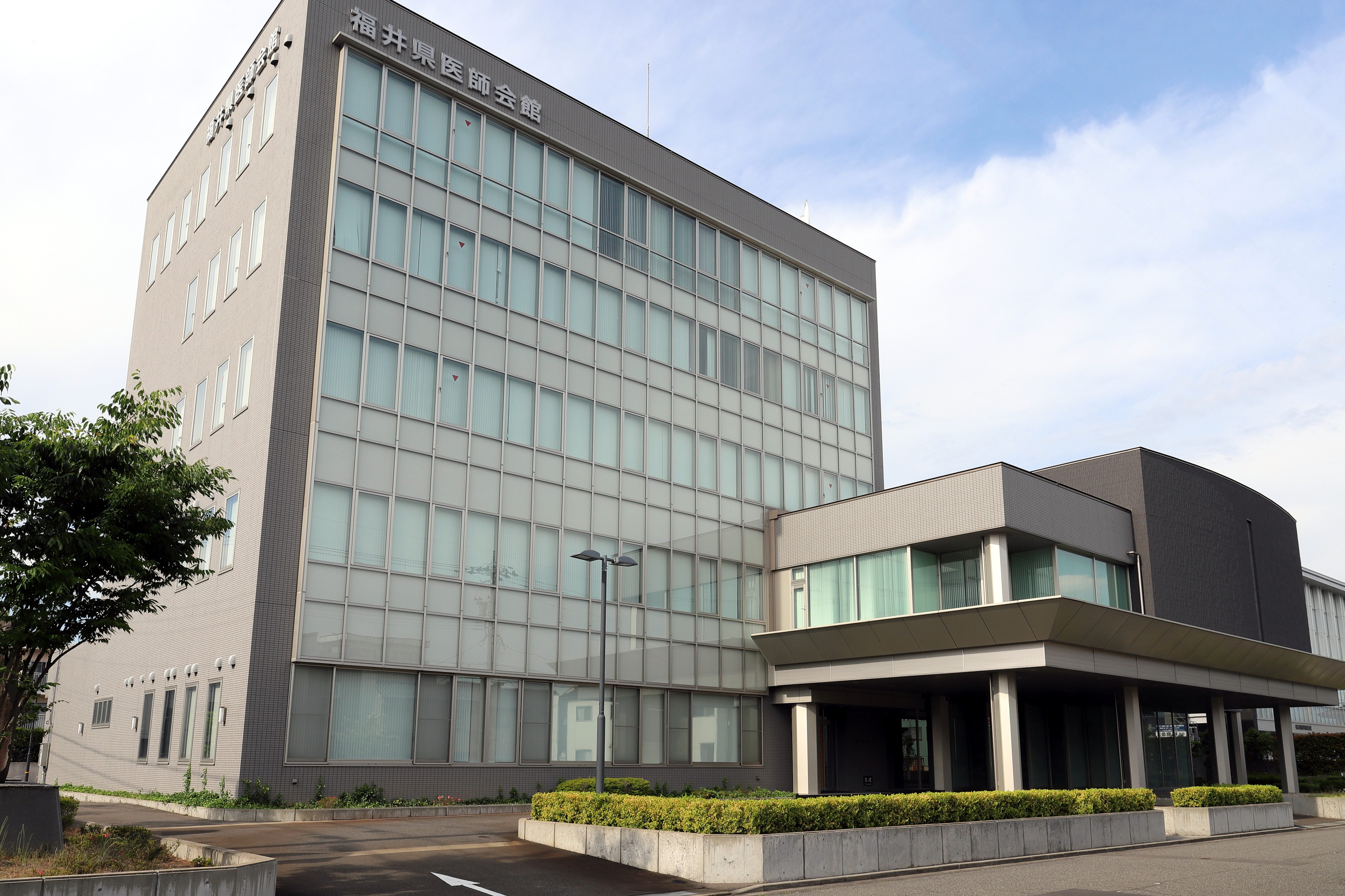 福井県医師会館 Canon EOS 6D Mark II